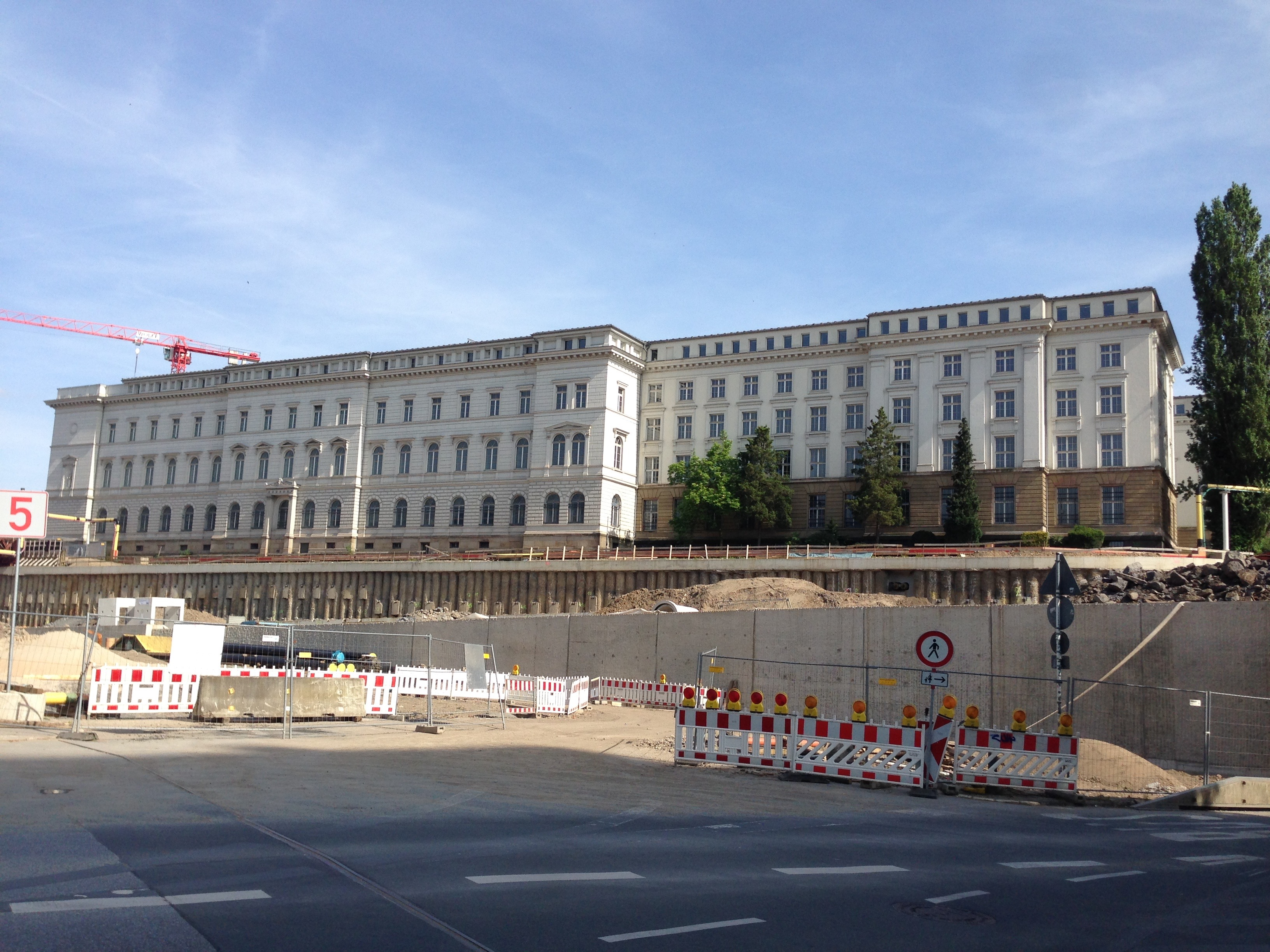 Alte Bundesbahndirektion am Döppersberg in Wuppertal-Elberfeld